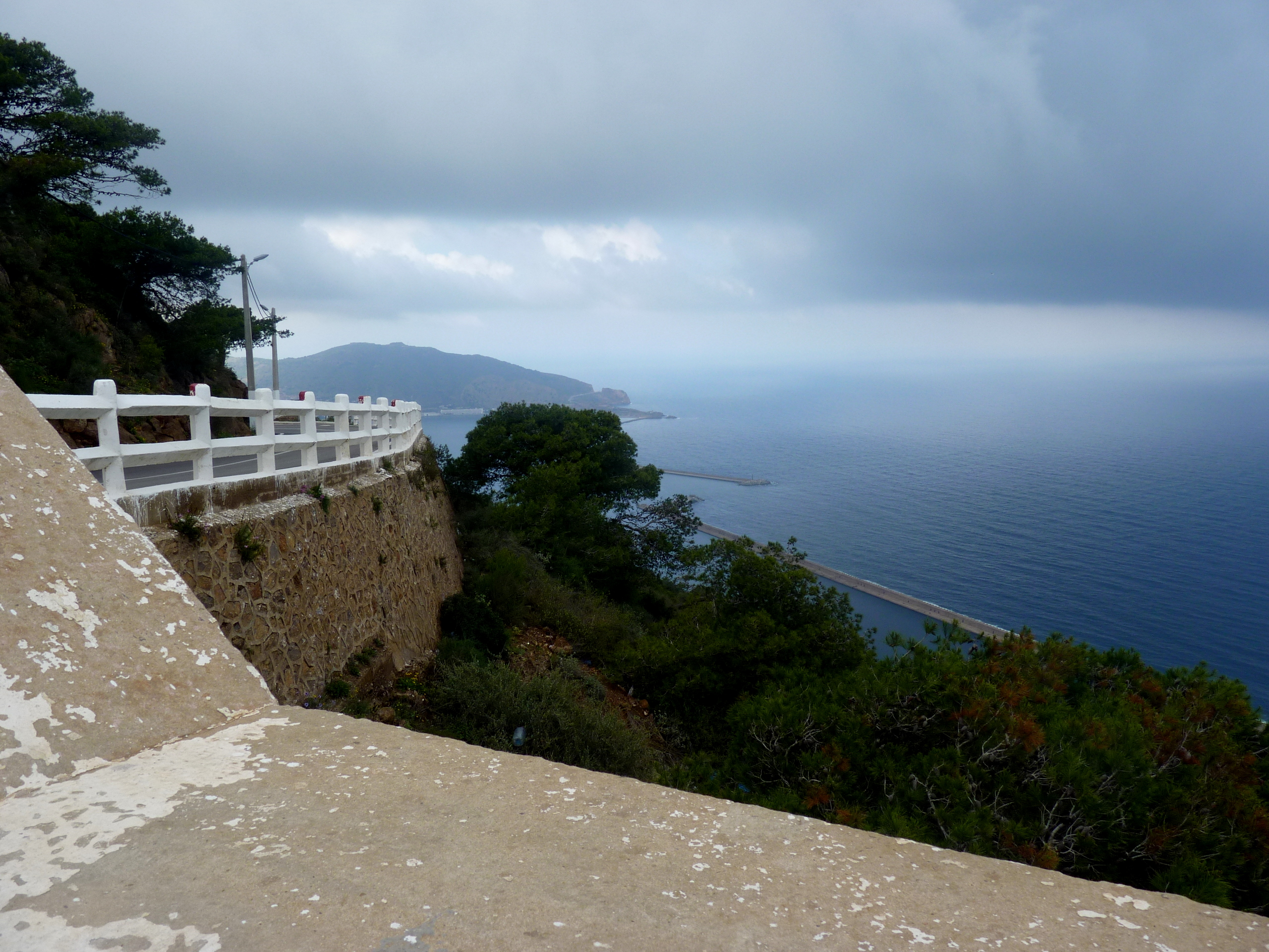 Algérie Mai 2011; Mers el-Kébir, les jetées du port vues depuis Santa-Cruz.